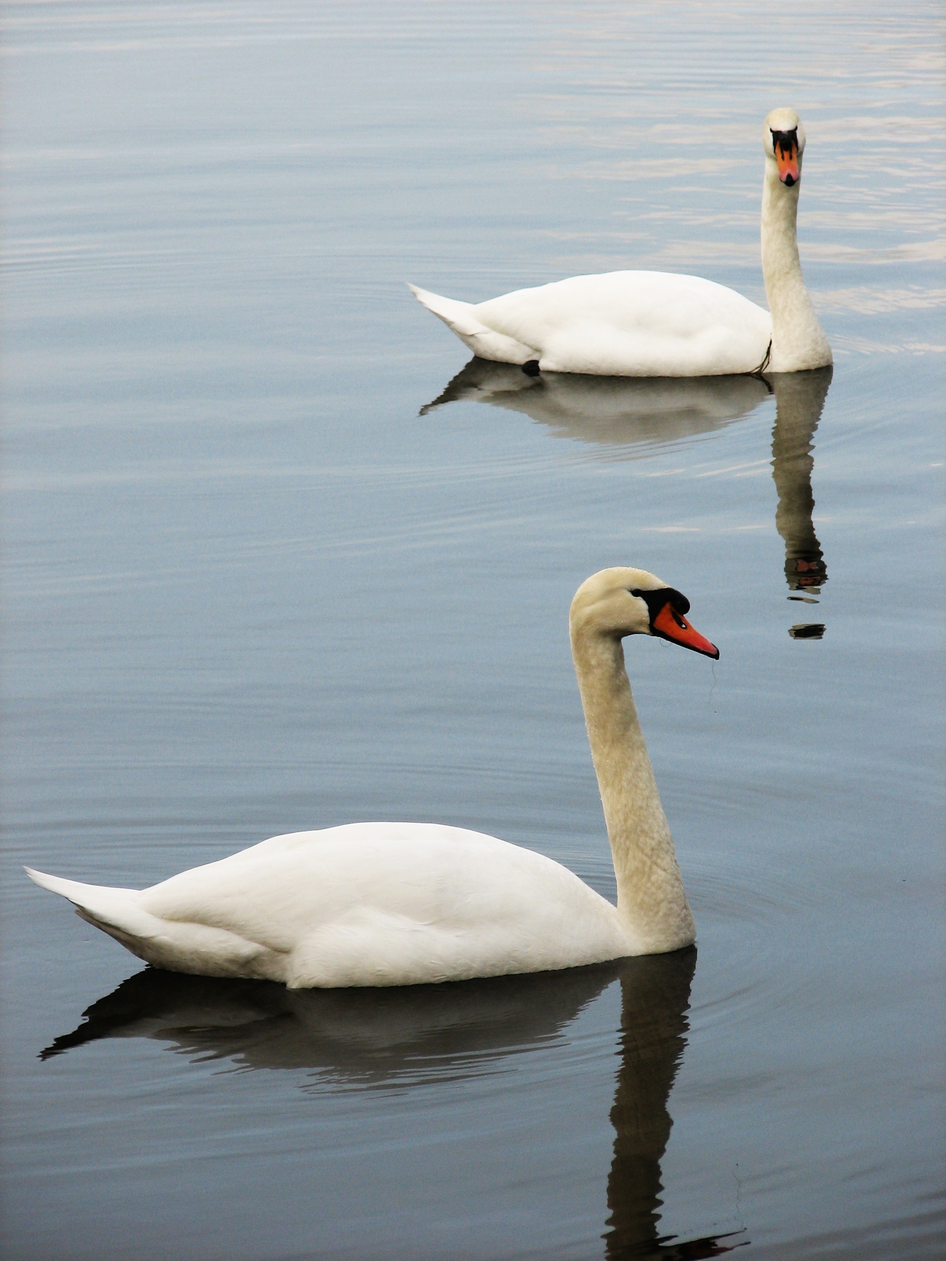 Zwei Schwäne an der Sechs-Seen-Platte in Duisburg